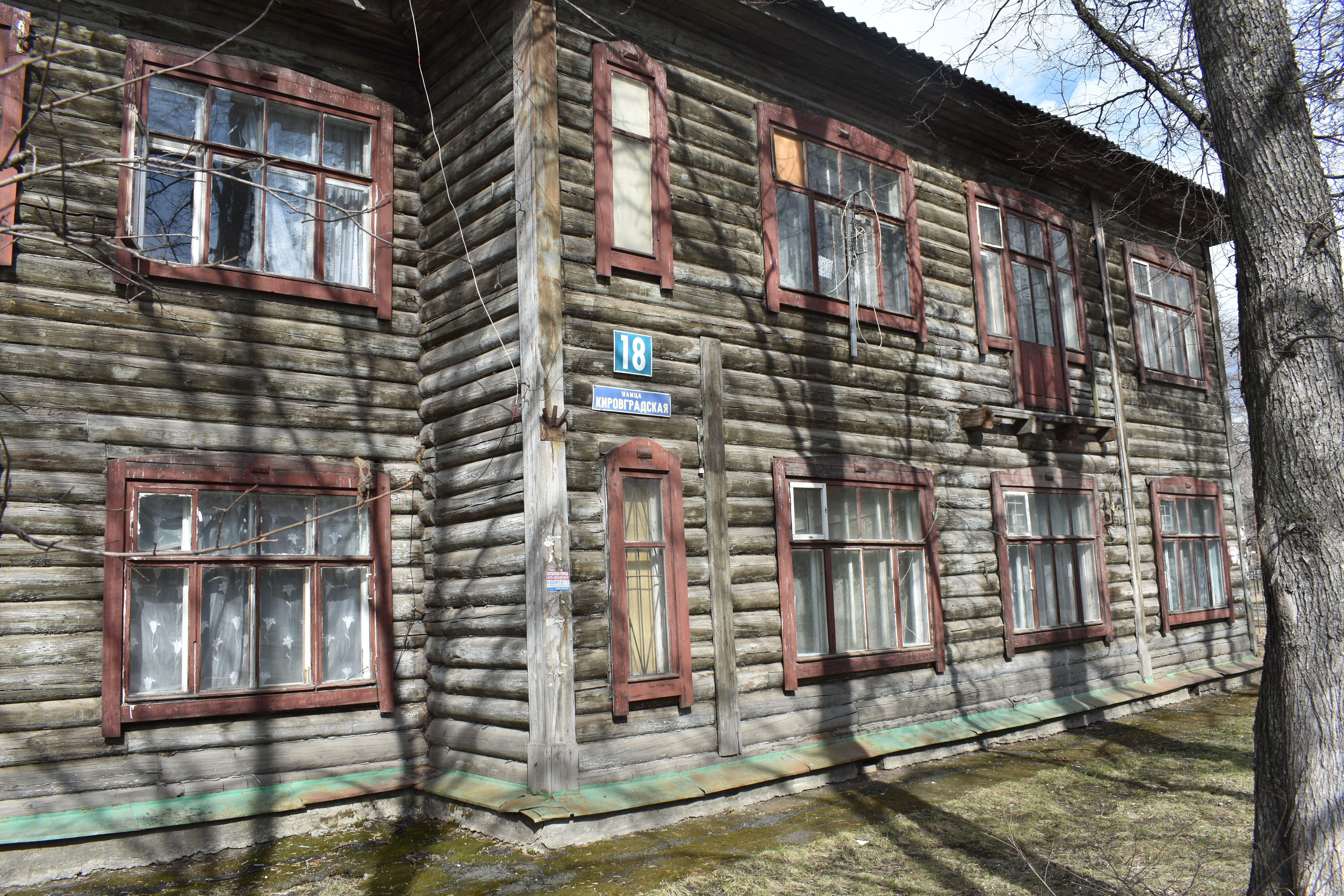 Дом на улице Кировградской, 18 в Екатеринбурге. Один из трёх первых домов на улице, построен в 1928 году